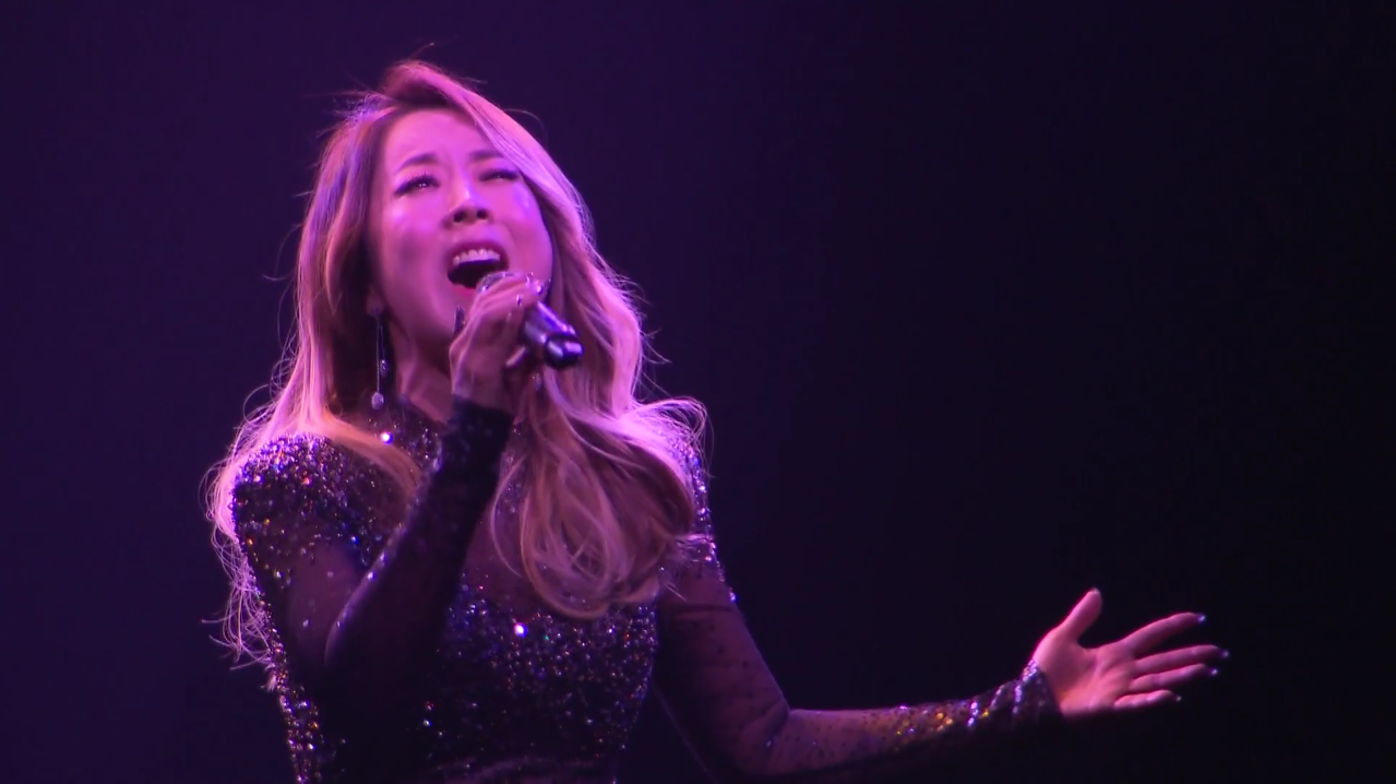 가수 양파의 첫 뮤지컬 '보디가드' 인터뷰